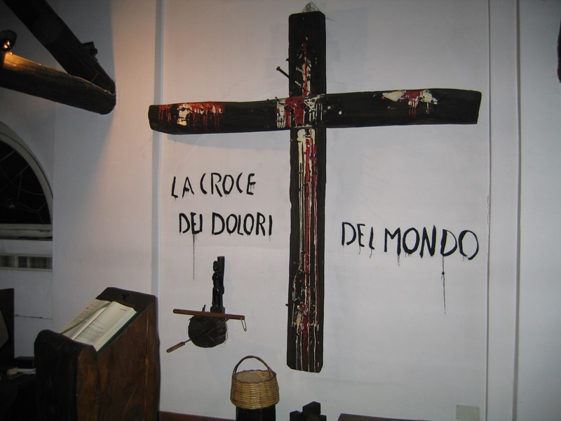 La Croce della cappella presente all'interno dell'Arsenale della Pace di Torino, sede del Sermig (Servizio missionario giovani)